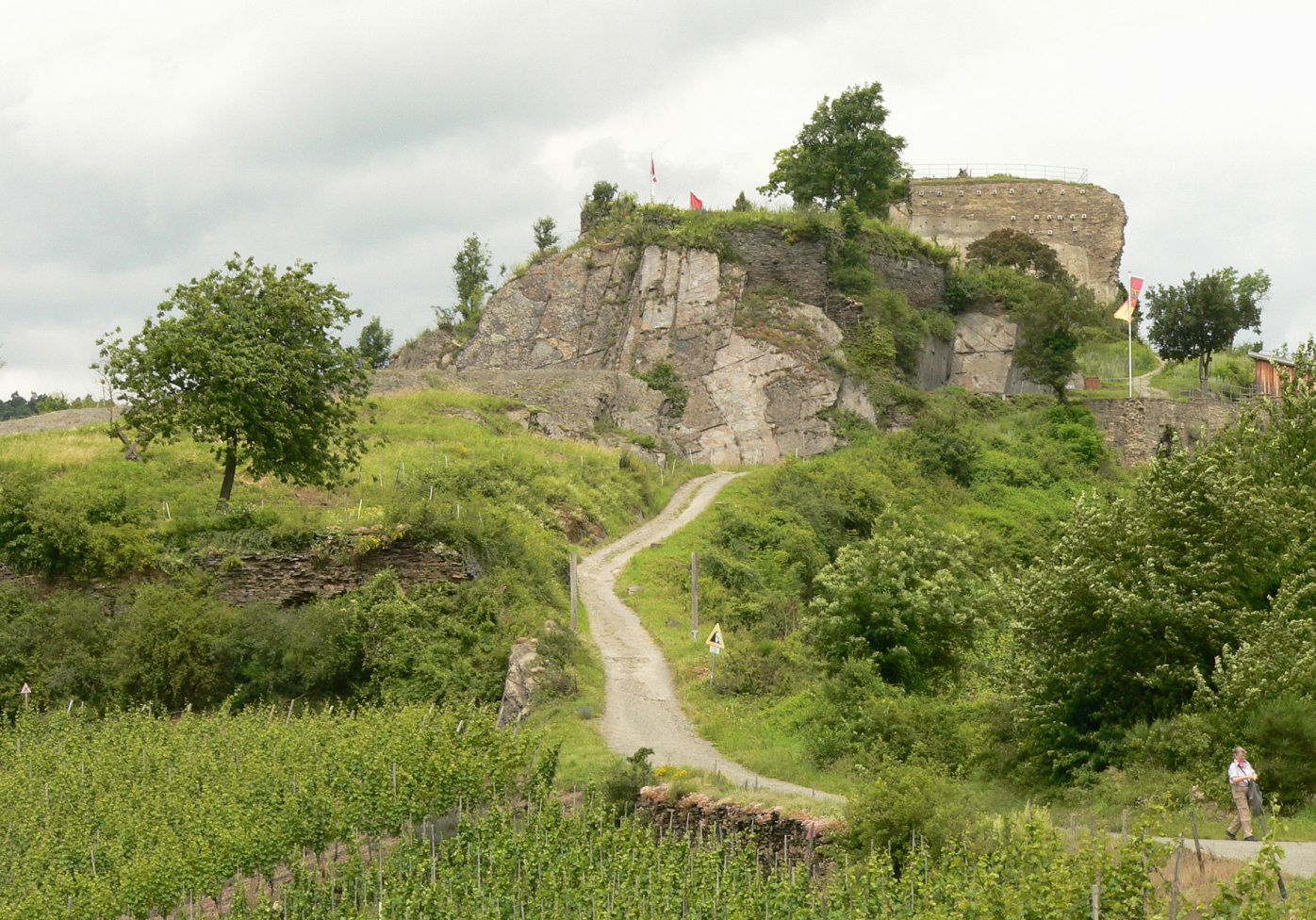 Saffenburg